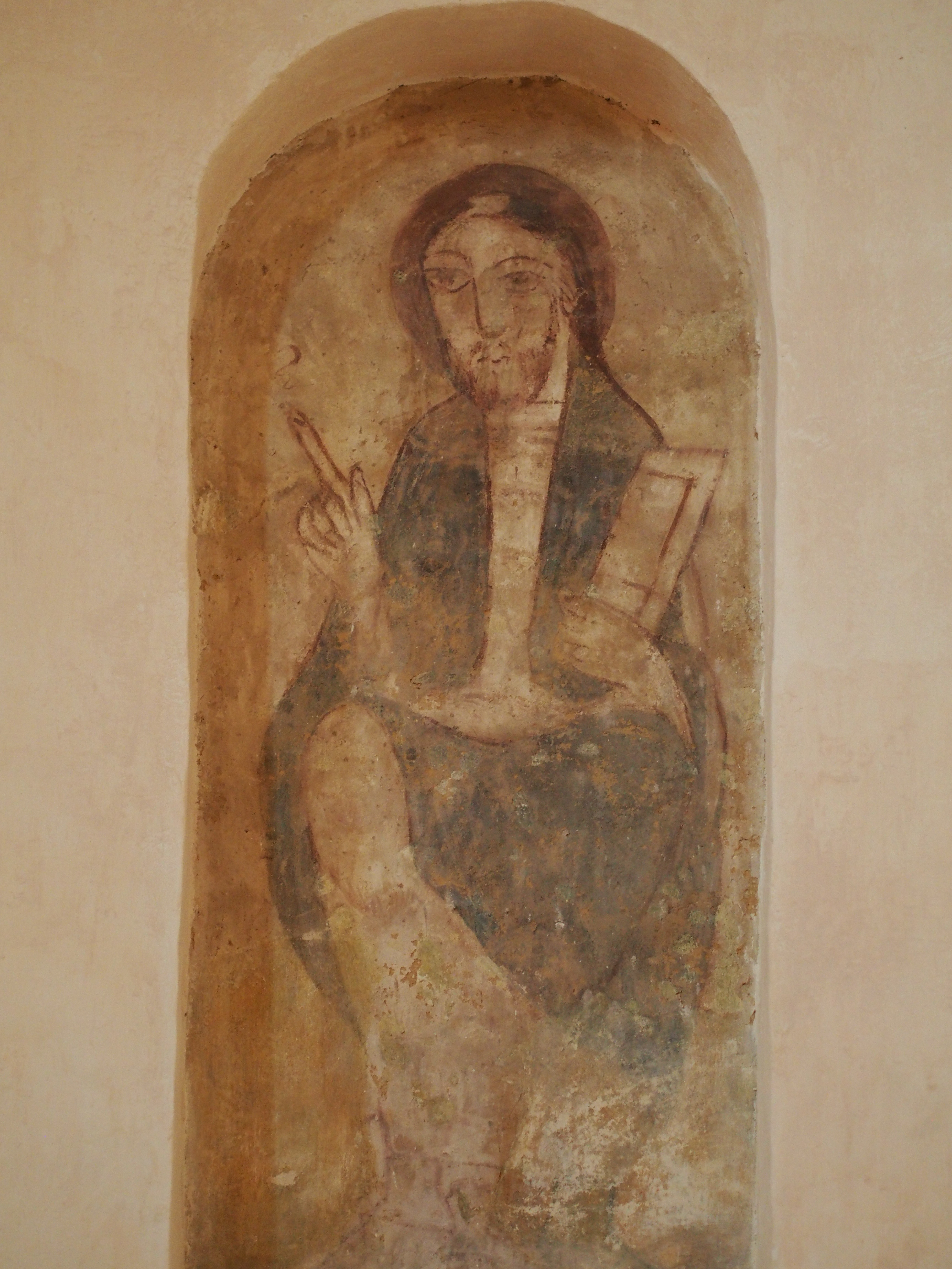 Fresque du XIIe siècle dans l'église Notre-Dame-sur-l'eau de Domfront (France).